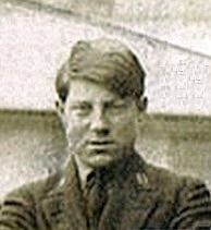 Jean Gabin (détail) sur une photo de classe du Lycée Jeanson de Sailly (Paris 16e arrond.). Photographie de l'atelier de Pierre Petit.